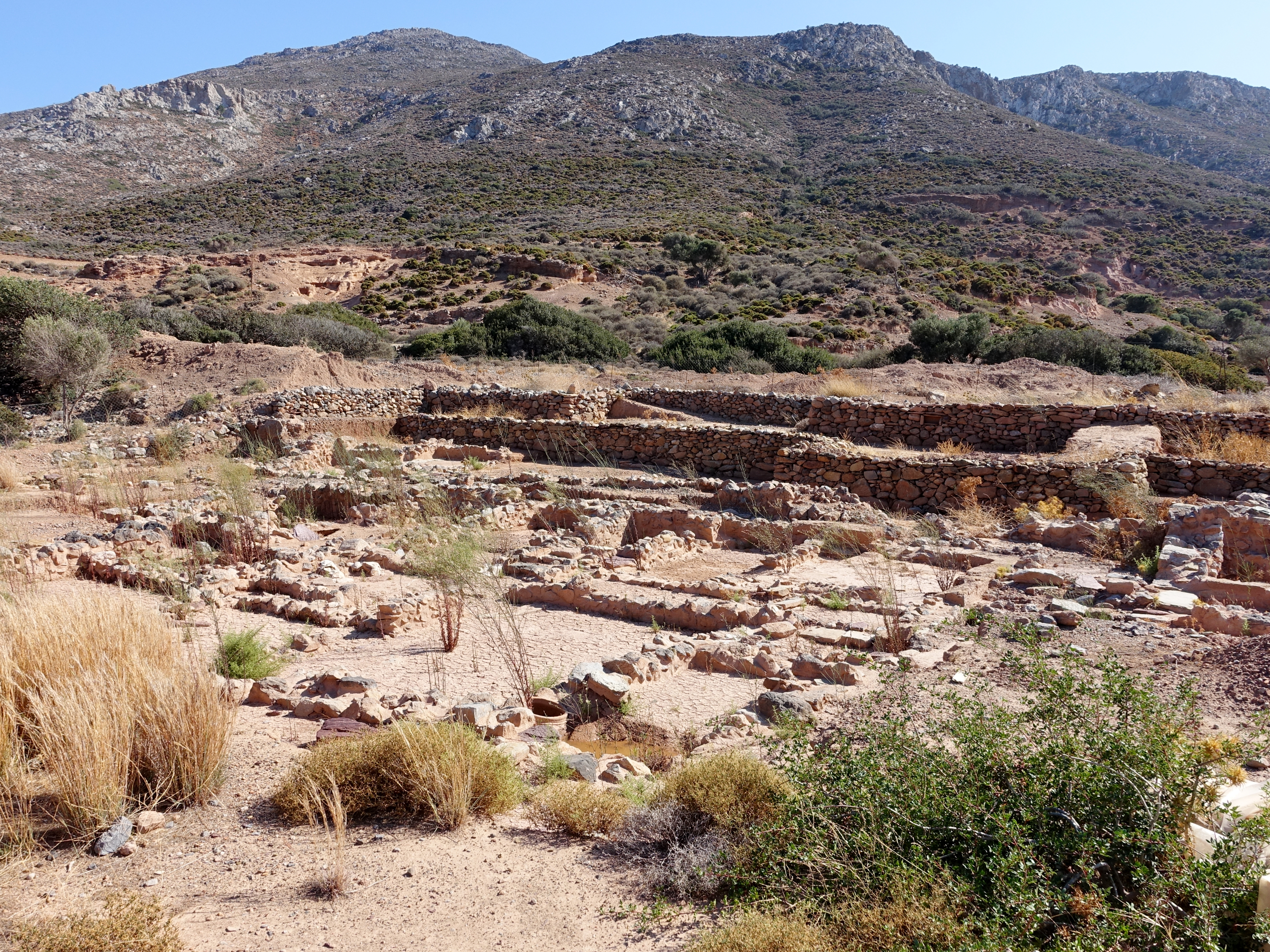 Bereiche Argyrakis, Mavrokoukoulakis und Papadakis der Ausgrabungsstätte von Roussolakkos (Ρουσσόλακκος) nahe Palekastro, Gemeinde Sitia, Kreta, Griechenland